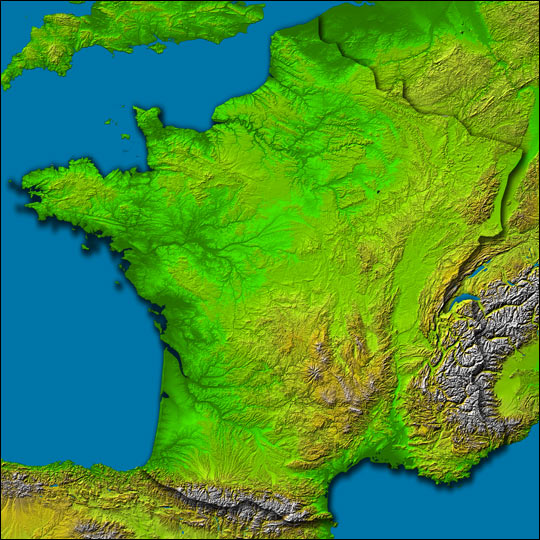 The Topography of France Location: 42 to 51.5 ° North, 5.5 West to 8 ° East Orientation: North toward the top, Mercator projection Image Data: shaded and colored SRTM elevation model Original Data Resolution: 1 arcsecond (~30 meters) Date Acquired: February 2000 Image Courtesy SRTM Team NASA/JPL/NIMA "Any and all materials published on the Earth Observatory are freely available for re-publication or re-use, except where copyright is indicated."